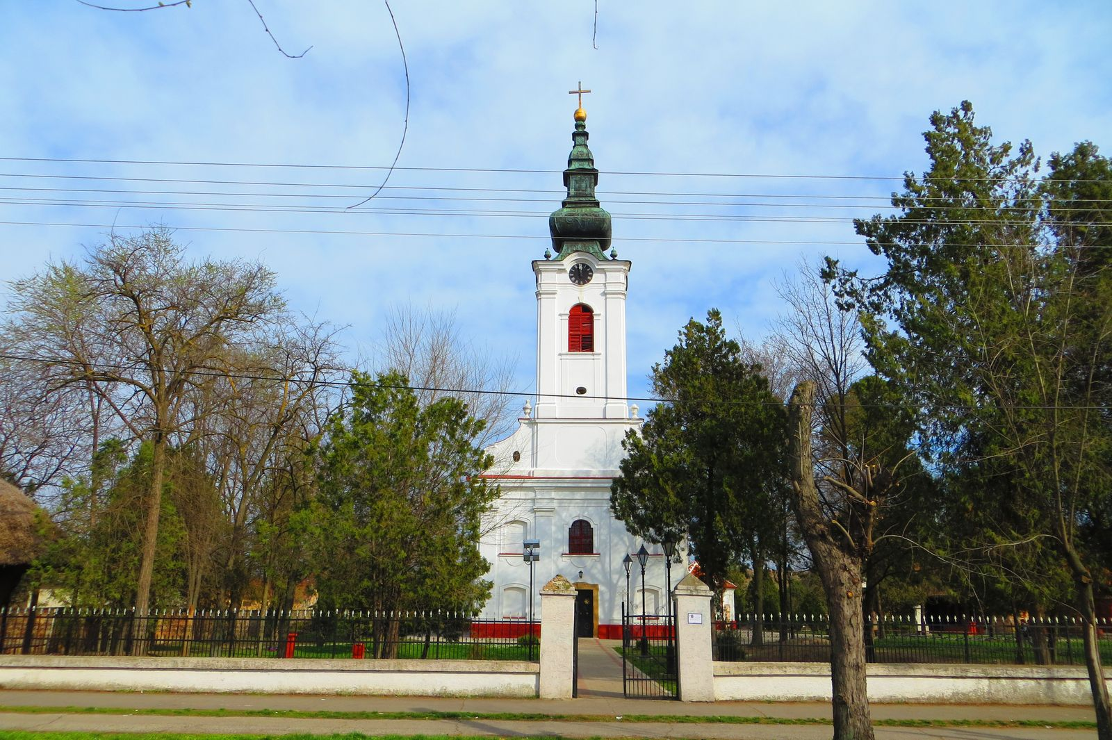 Hram Vavedenja presvete Bogorodice